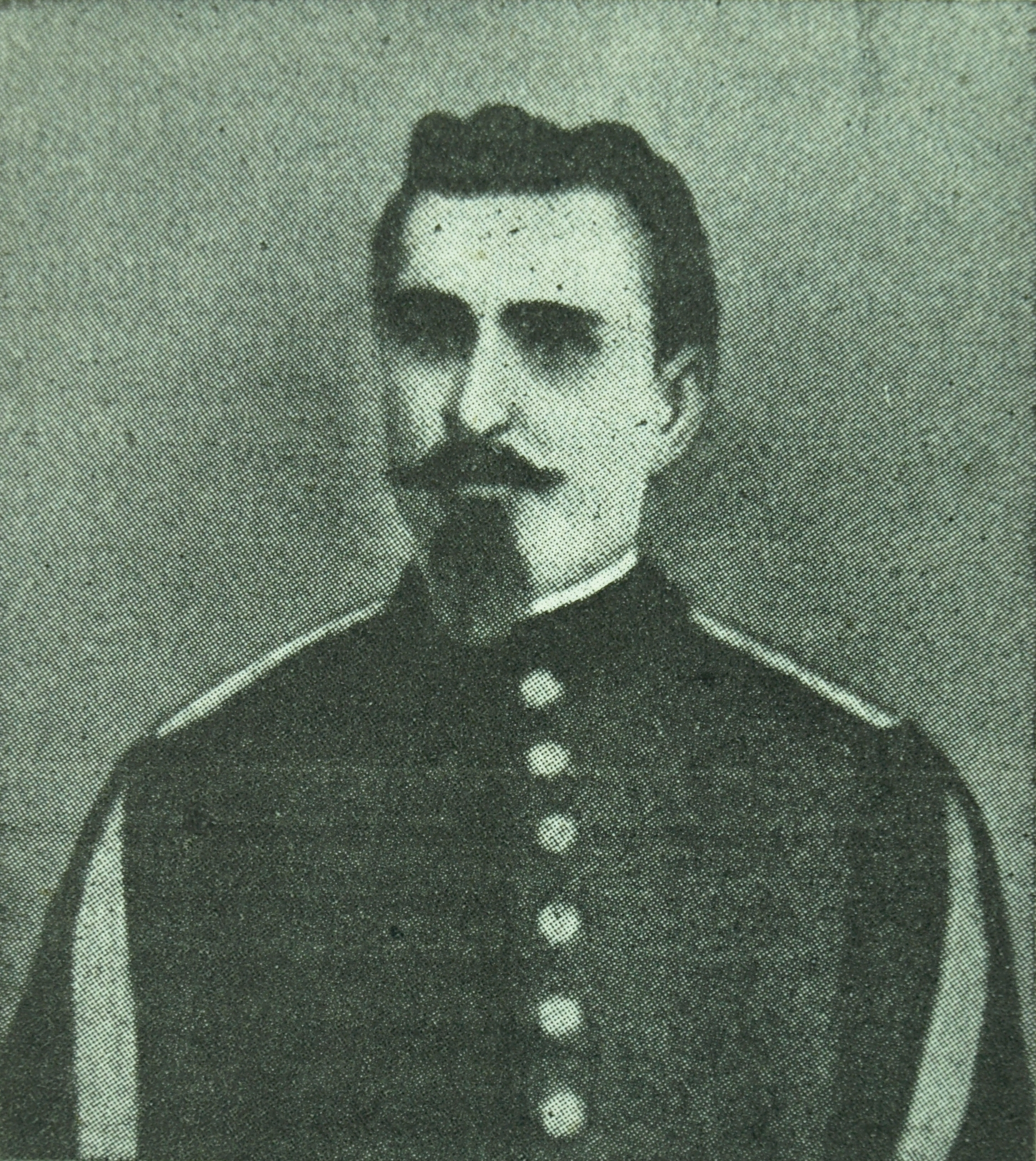 Botànic i metge